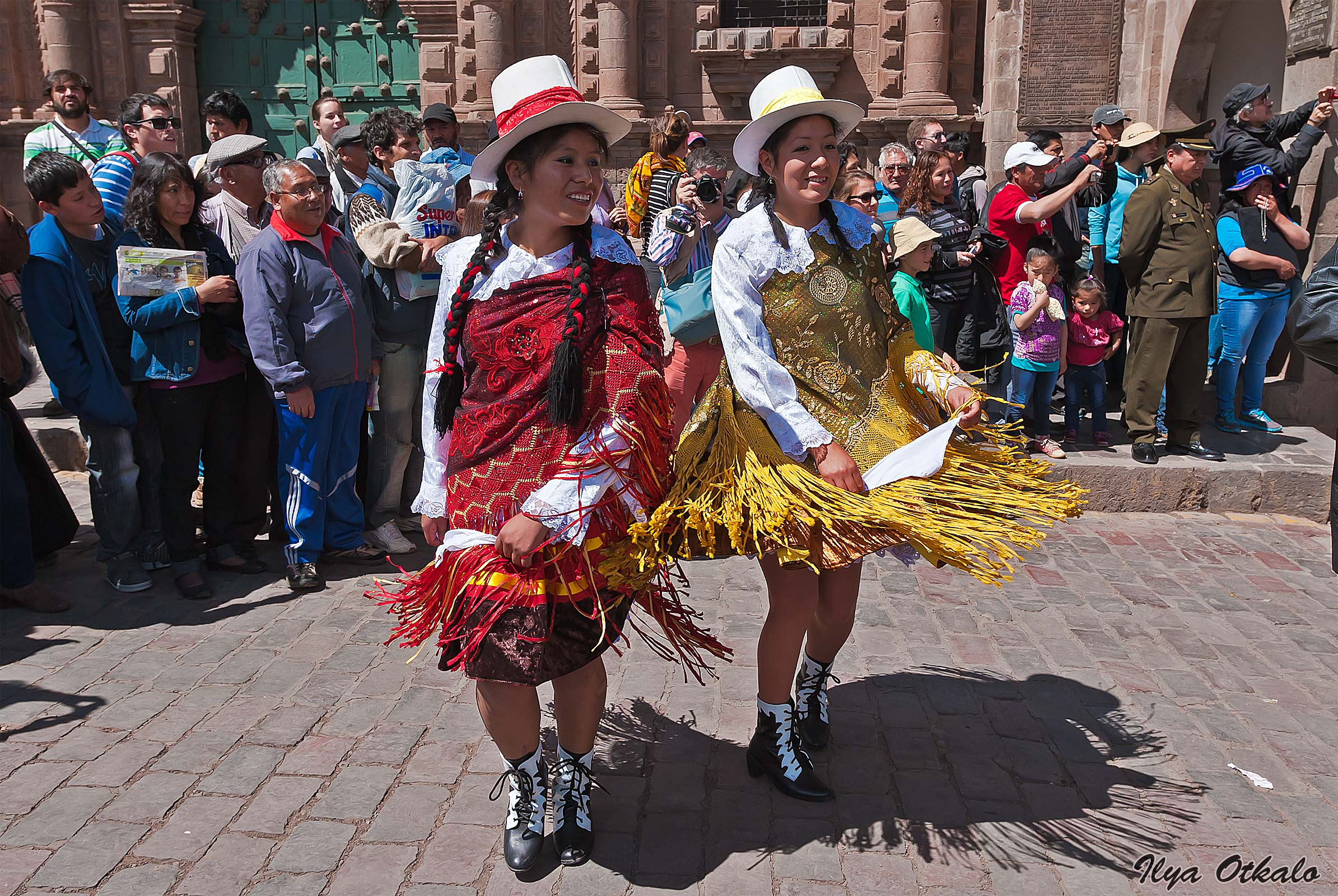 Карнавал в Пуно